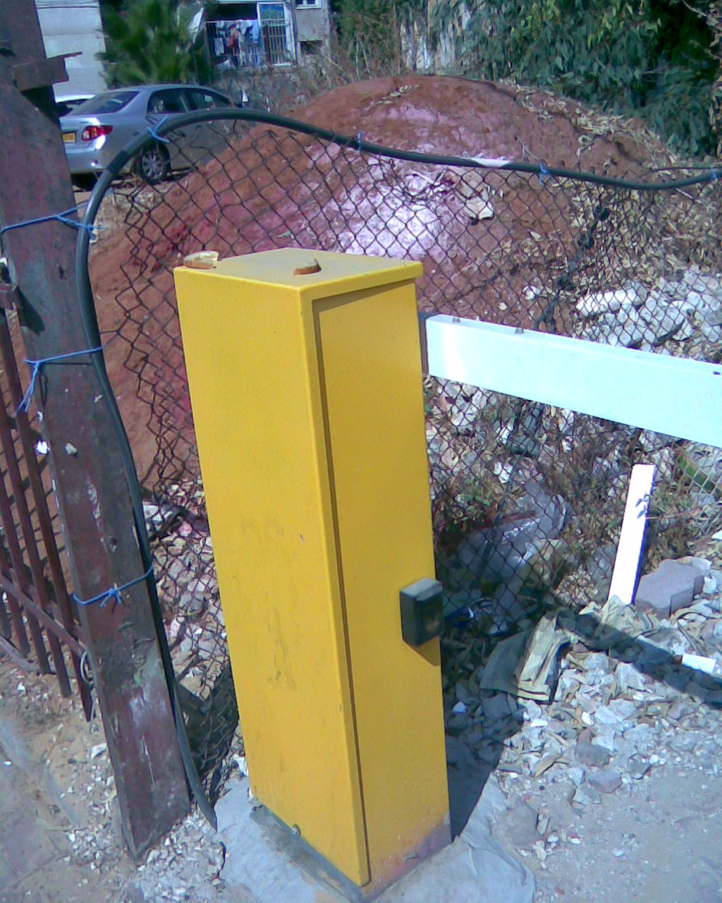 Electric_eye עין אלקטרונית של שער חשמלי